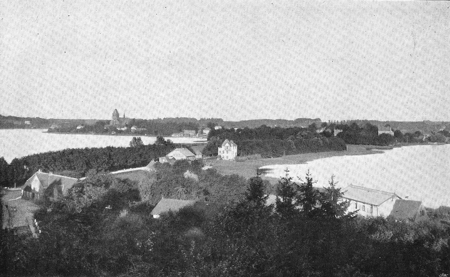 Ratzeburg, von Westen aus gesehen